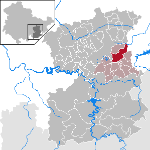 Dittersdorf in Thuringia - Saale-Orla-Kreis